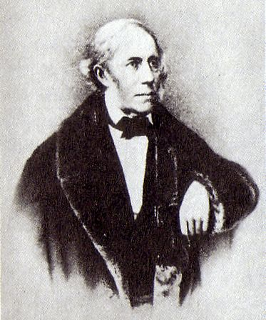 Portrait des Unternehmers Gustav Harkort (1795-1865), um 1850. Unbekannter Autor